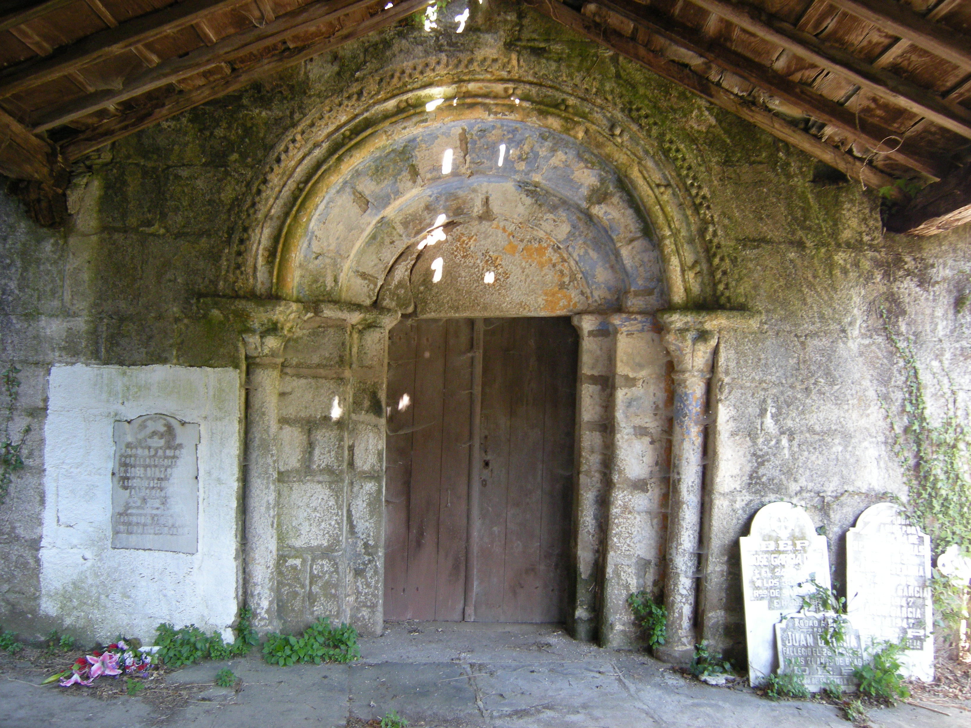 Portada occidental.